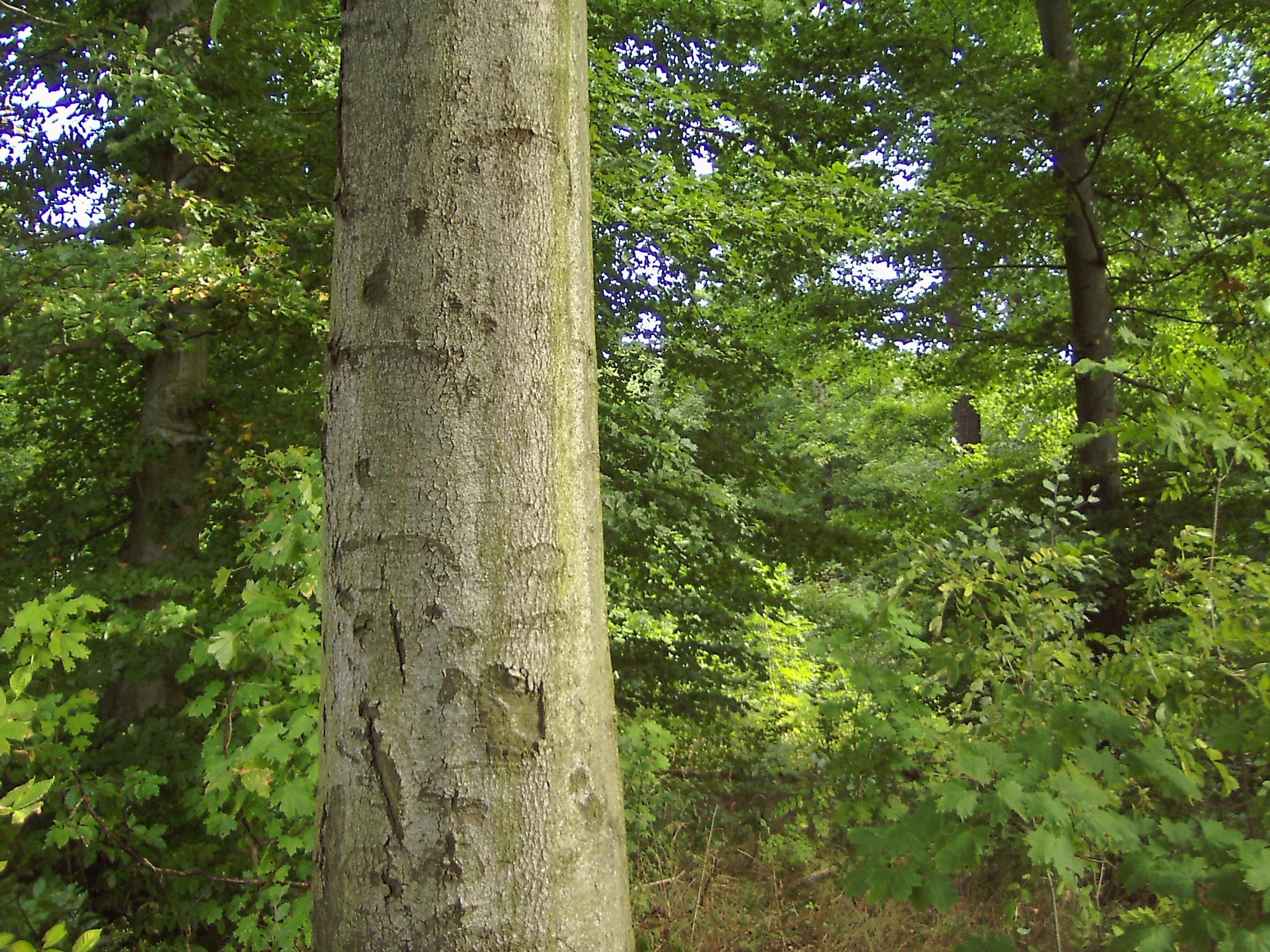 Strukturreicher Buchenwald im Norden des Volkenroder Waldes.